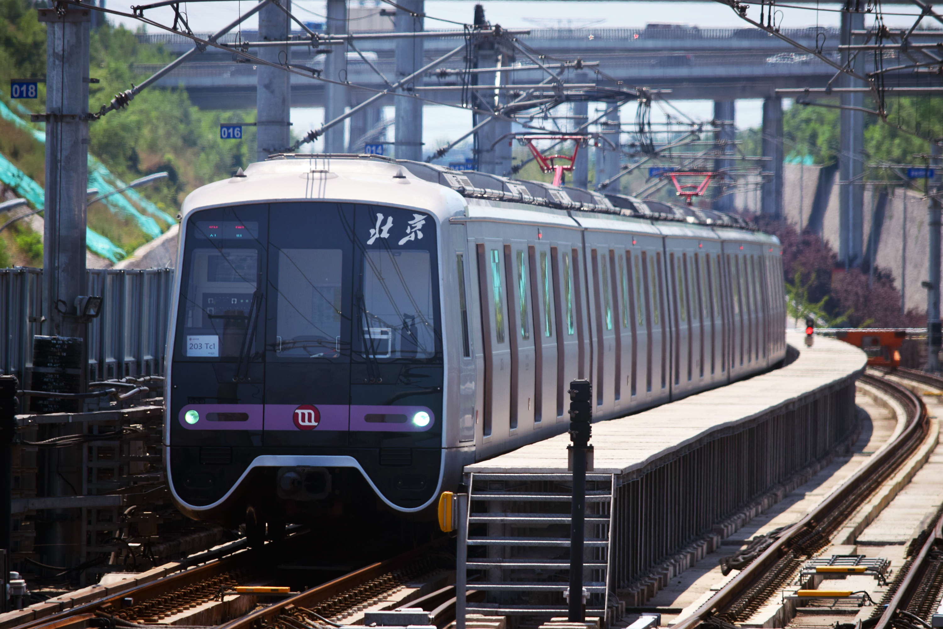 中文（中国大陆）: 一列DKZ53正在张郭庄后的折返线折返。